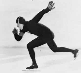 Europese kampioenschappen schaatsen heren allround in Davos. Europees kampioen Boris Shilkov (Sovjet-Unie) in actie.